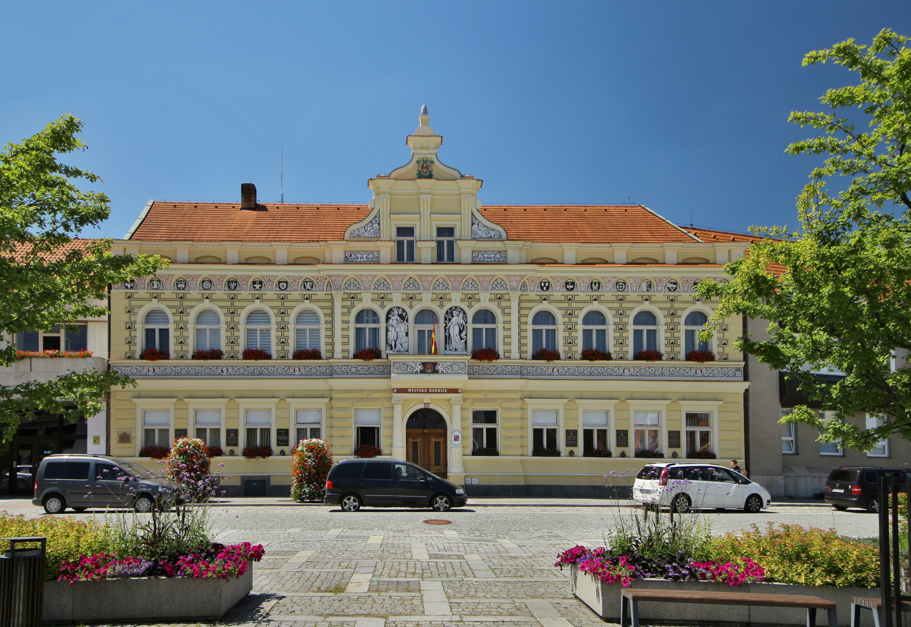 Milevsko náměstí a radnice